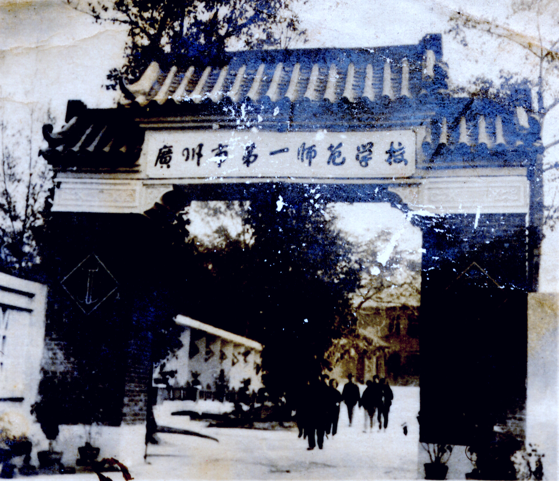 协和中学老校门，摄于1963年。